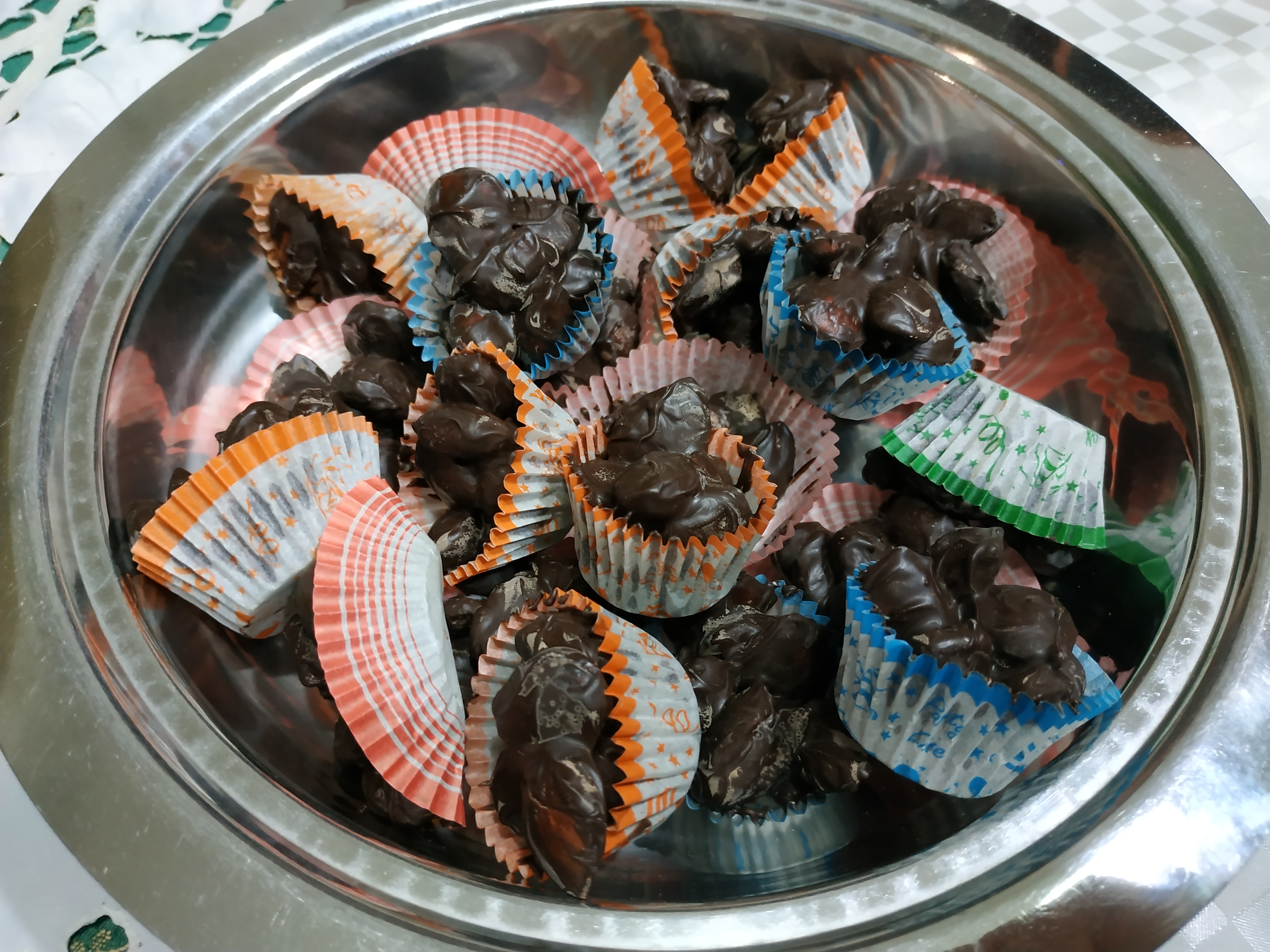 Dolce cioccolato e mandorle